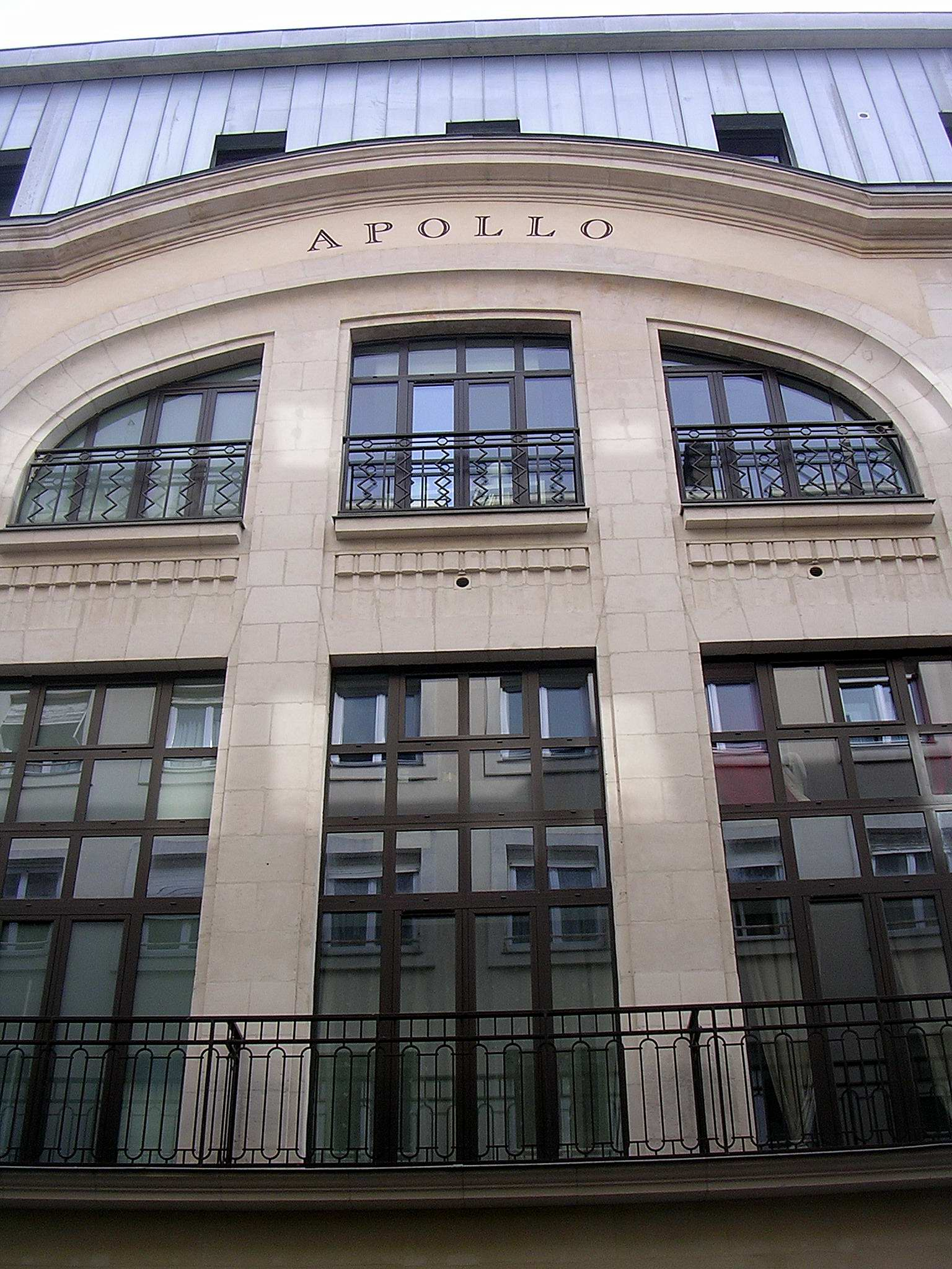 Ancien cinéma Apollo de Nantes